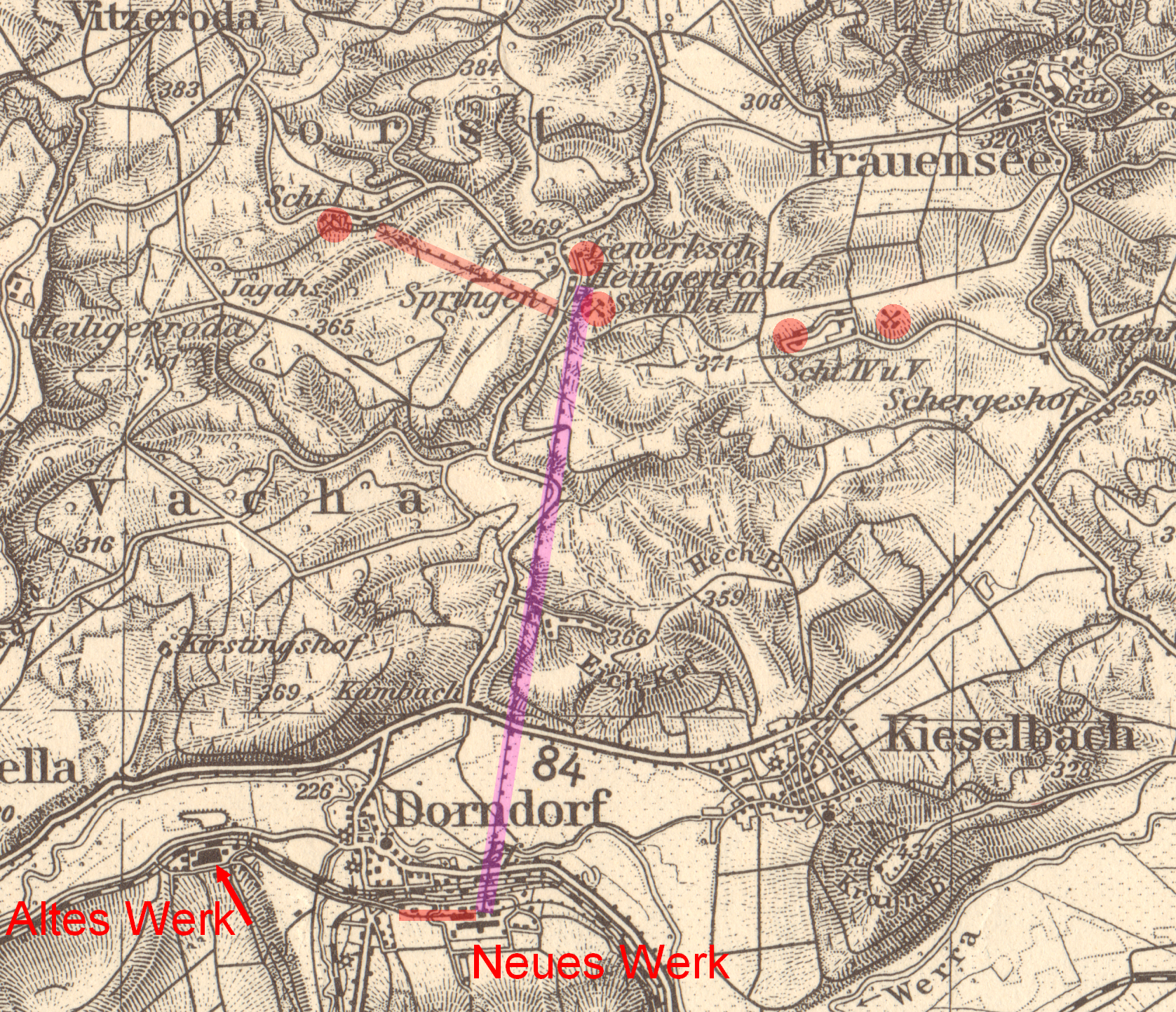 Kartenausschnitt mit Lage der ehemaligen Kaliwerke in Dorndorf/Werra, und der Schachtanlagen der Gewerkschaft Heiligenroda in Springen und Möllersgrund. Eigene Ergänzung: farbliche Hervorhebungen der betreffenden Bergwerksanlagen.